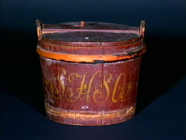 Smør ambar eller smørspann lagget i furu og datert 1872 fra Ullensaker i Akershus.Innskrift: SHSOF. 1872. Høyde 19 cm. Foto Anne Lise Reinsfelt / Norsk Folkemuseum, NF.1909-1842.